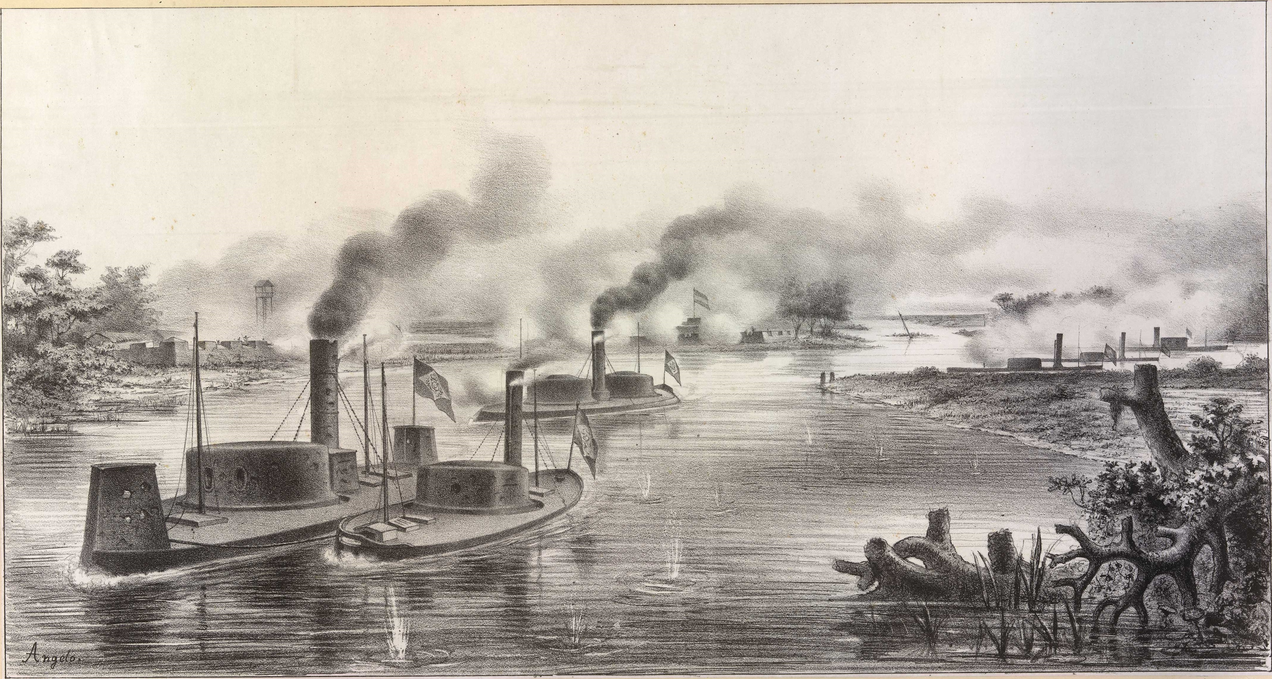 Divisão avançada da esquadra, passando em frente das baterias do Tebiquary no dia 23 de julho de 1868, as 3 horas da tarde.